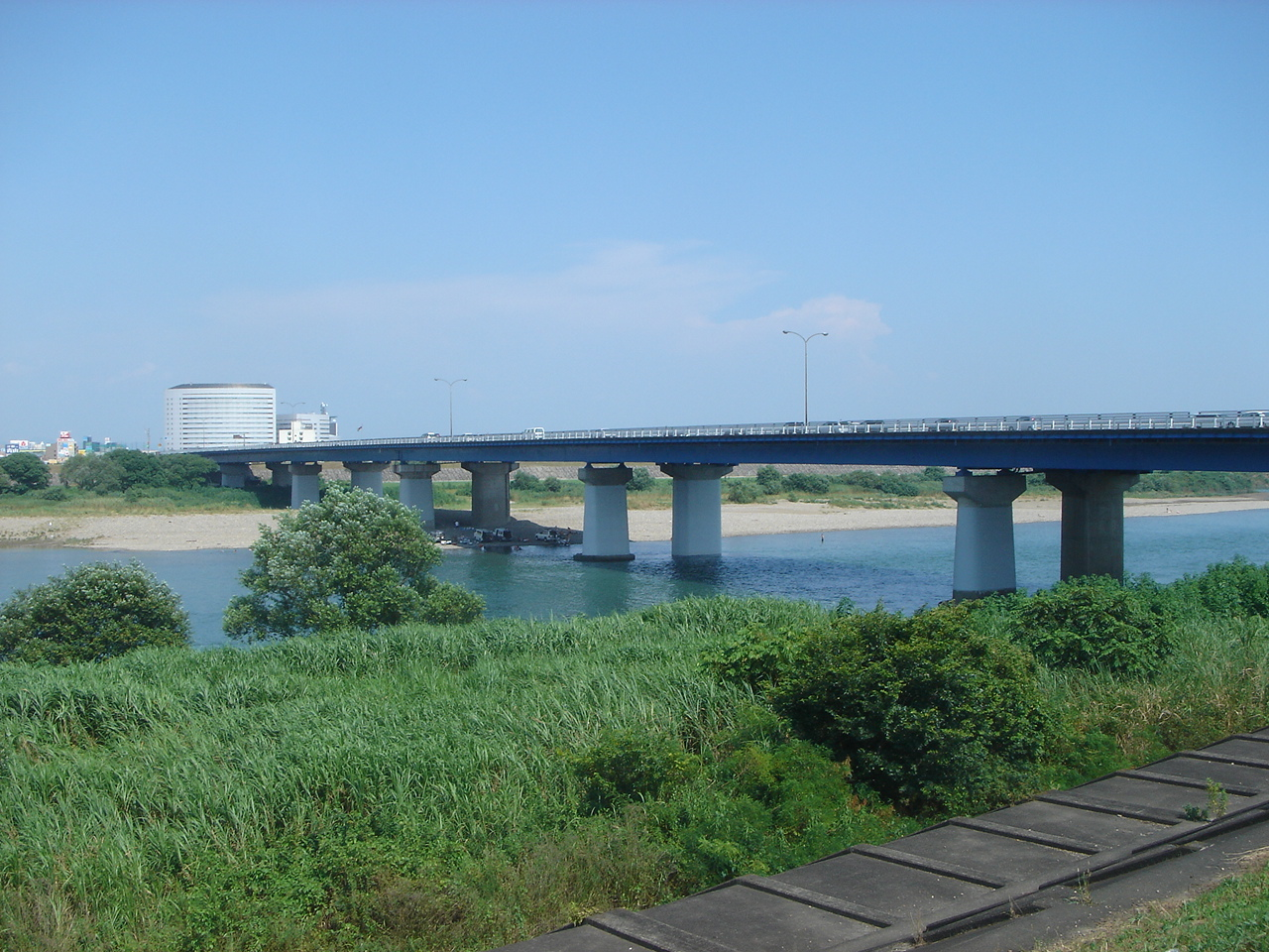 Hozumi-Ohashi(穂積大橋),Mizuho,Gifu,Japan(岐阜県瑞穂市)で右岸上流（北西）より撮影。